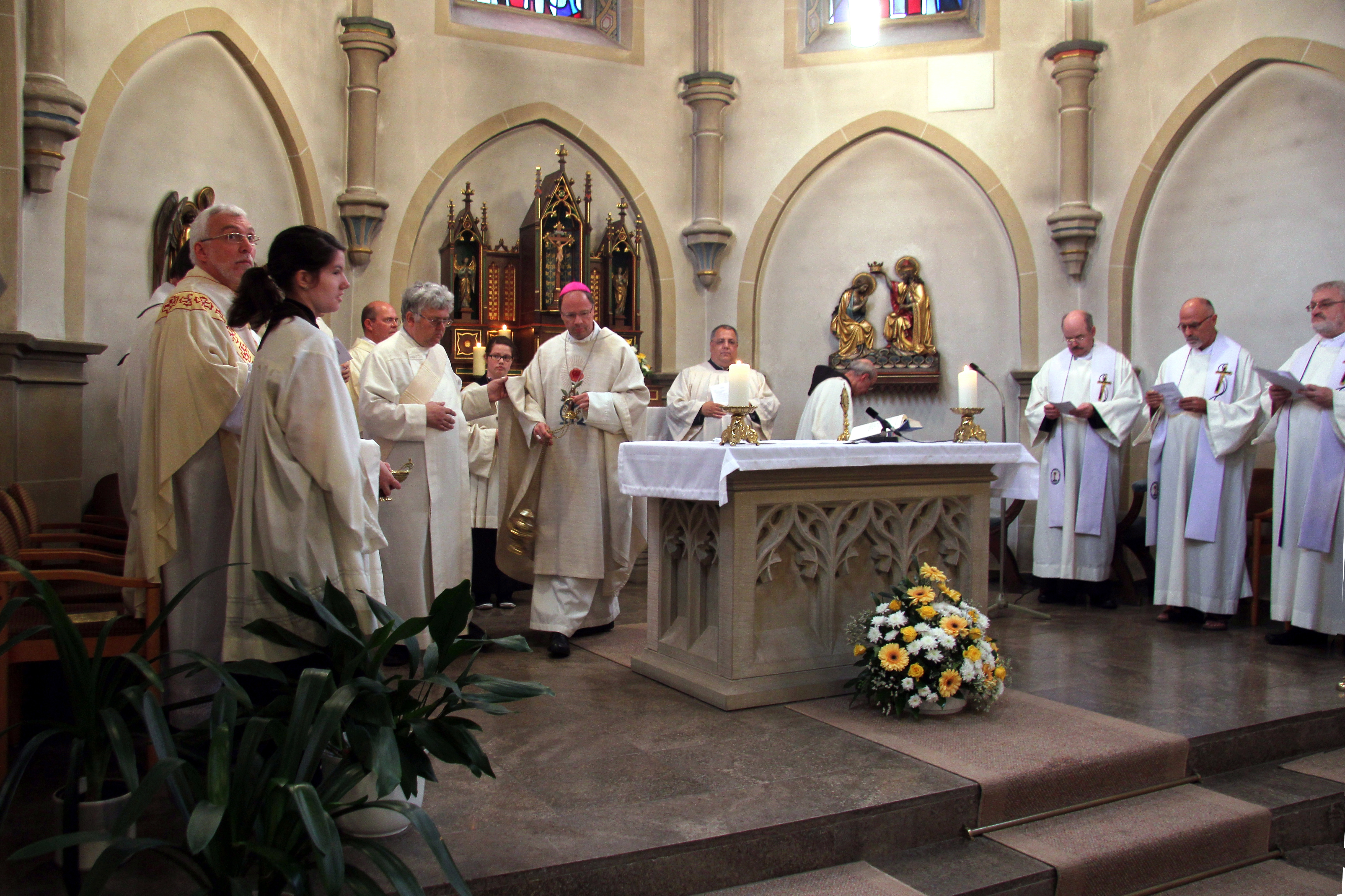 Kloster Maria Engelport im Flaumbachtal bei Treis-Karden - Festgottesdienst zur 100-Jahr-Feier „Engelporter Madonna“ mit Bischof Stephan Ackermann)